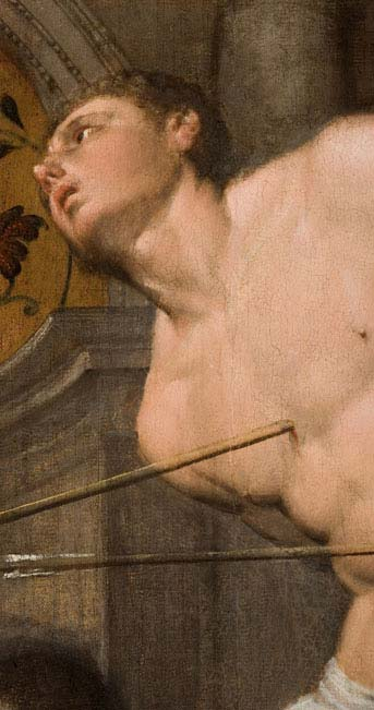 detail